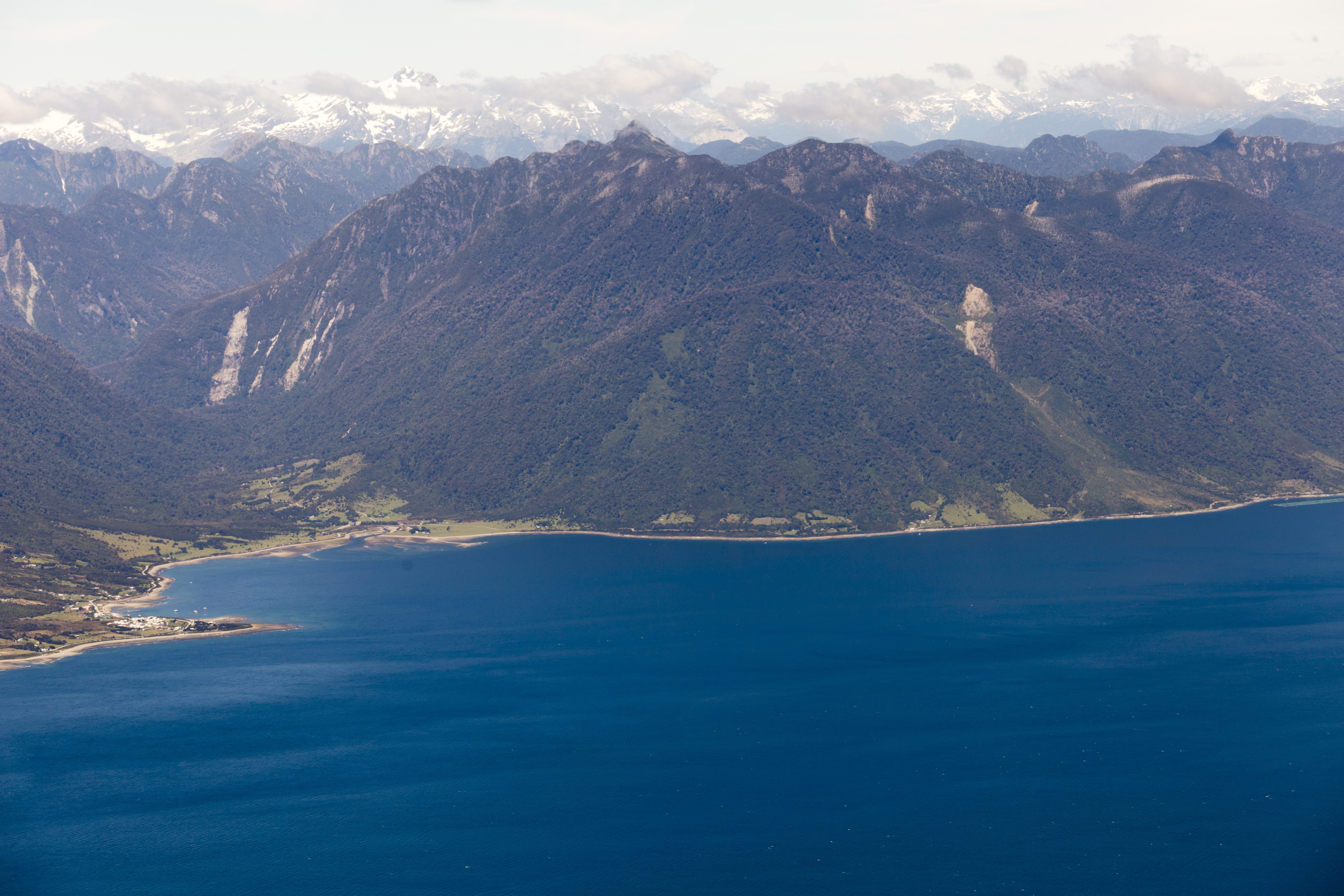 Sector Buill en península de Huequi, comuna de Chaitén, Región de Los Lagos, Chile.